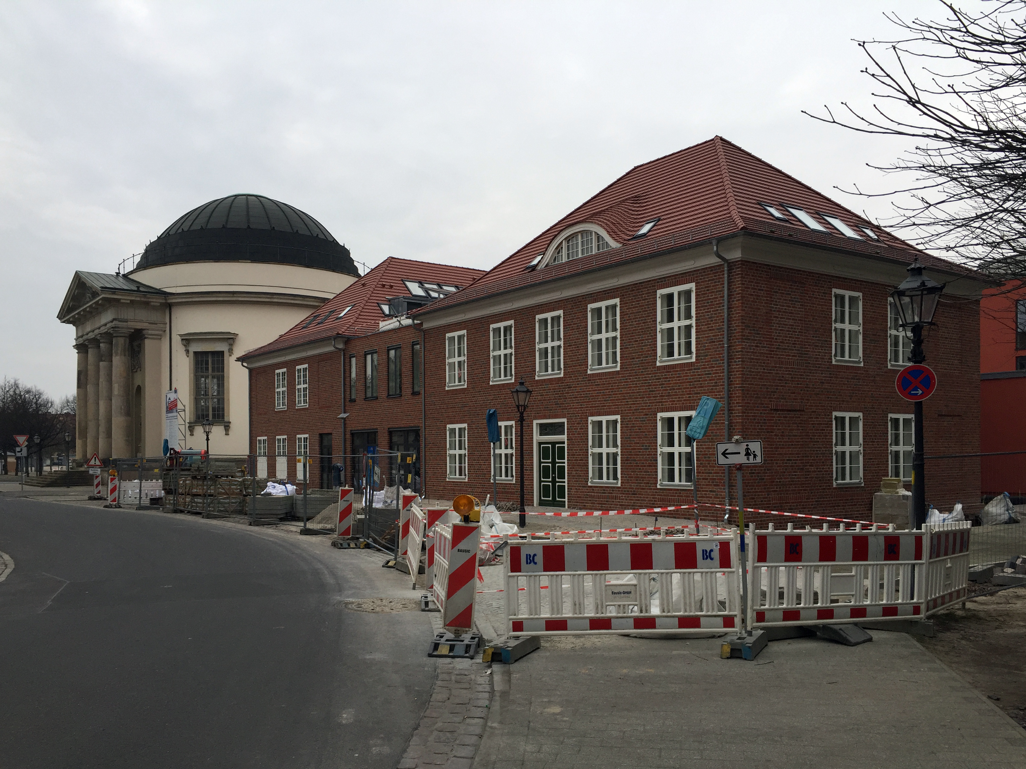 Das Seidenweberviertel oder Kleines Holländerviertel im März 2016 Südseite MAZ